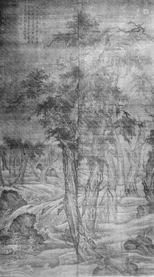 Vieux pins dans une forêt en hiver, rouleau en hauteur. Encre sur soie. H: 180cm. L: 104cm.attribué au peintre chinois Li Cheng Xe siècle. Taipei (Taiwan) National Palace Museum.